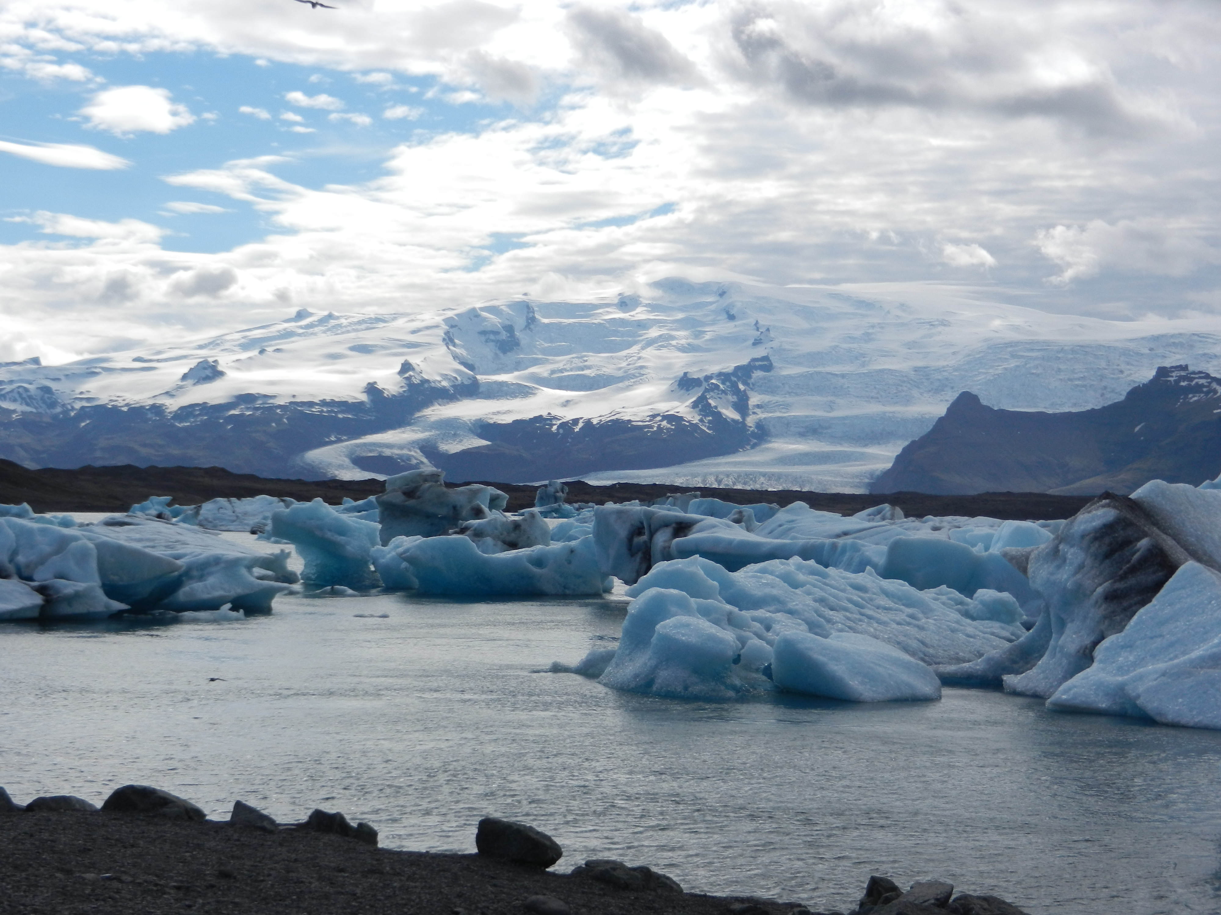 Ledene gore v laguni Jokulsarlon pod ledenikom Vätnajökull, Islandija.